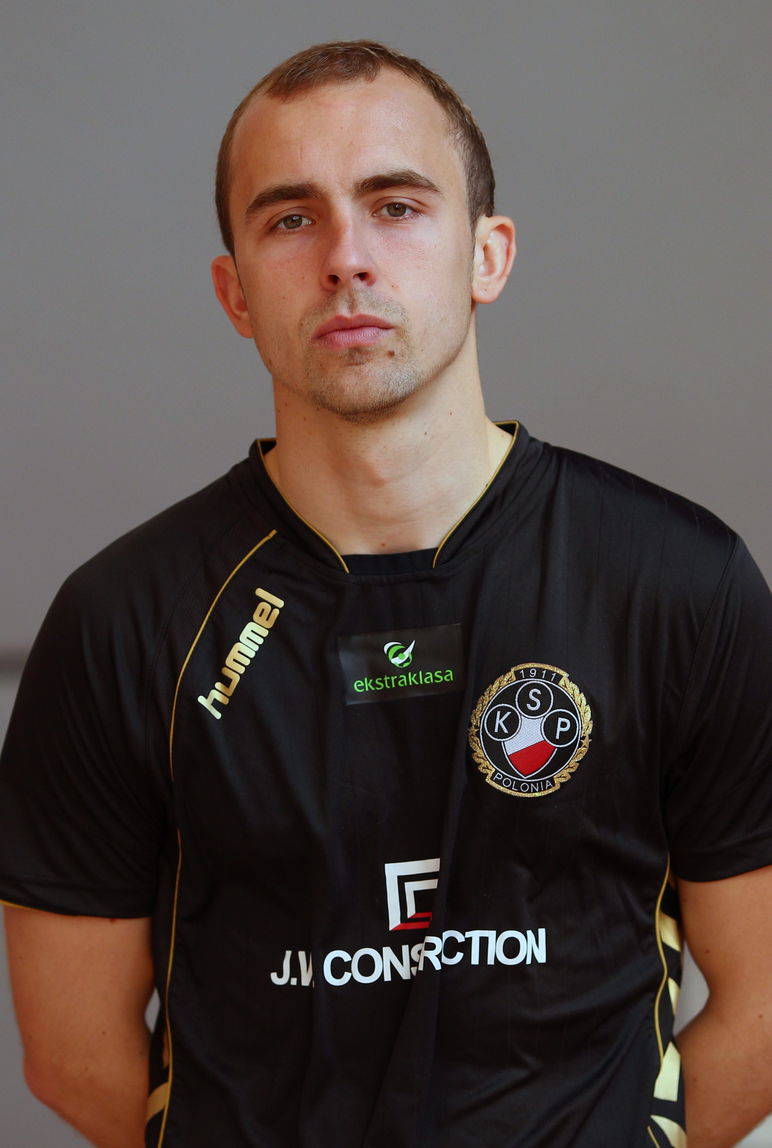 Adrian Mierzejewski, player of Polonia Warszawa (2011)